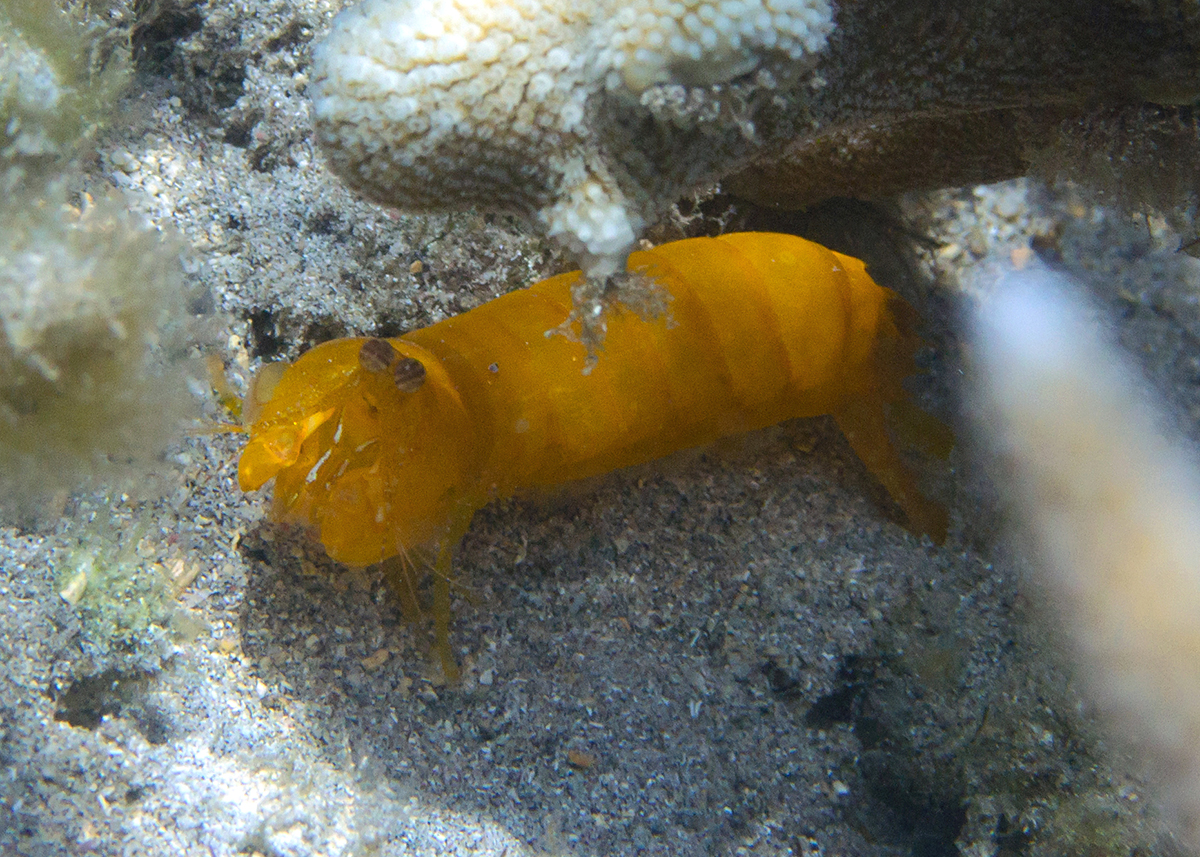 Une crevette-mante dorée Pseudosquilla ciliata observée à la Réunion (rare).